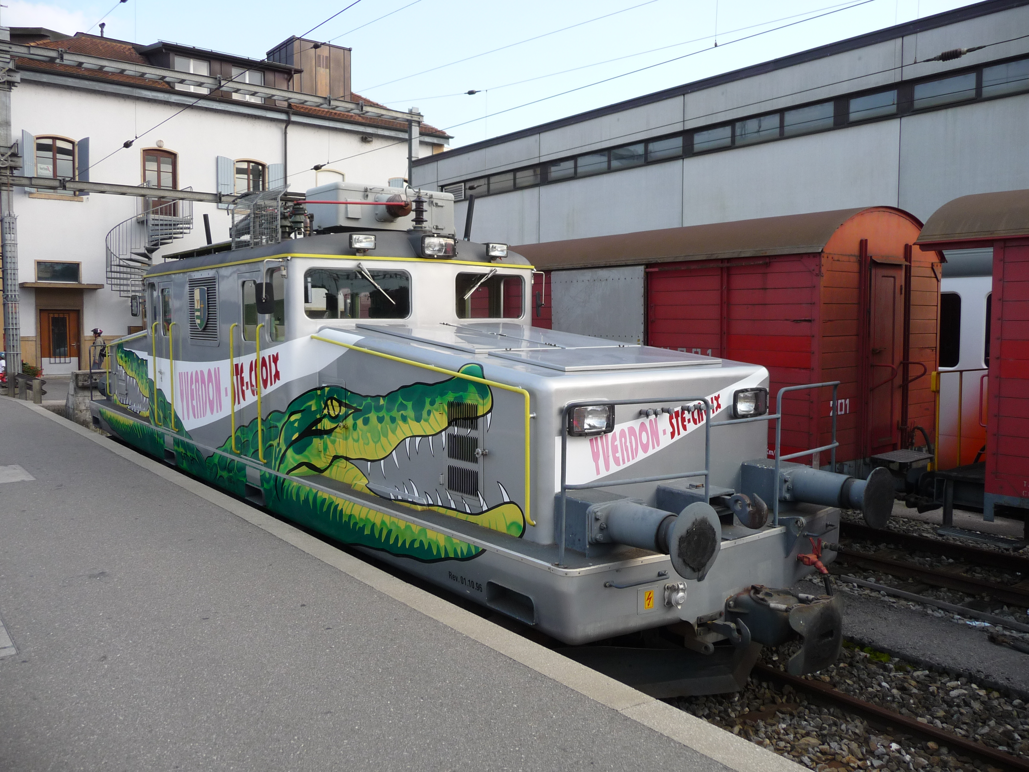 Ein Krokodil in Yverdon-les-Bains.